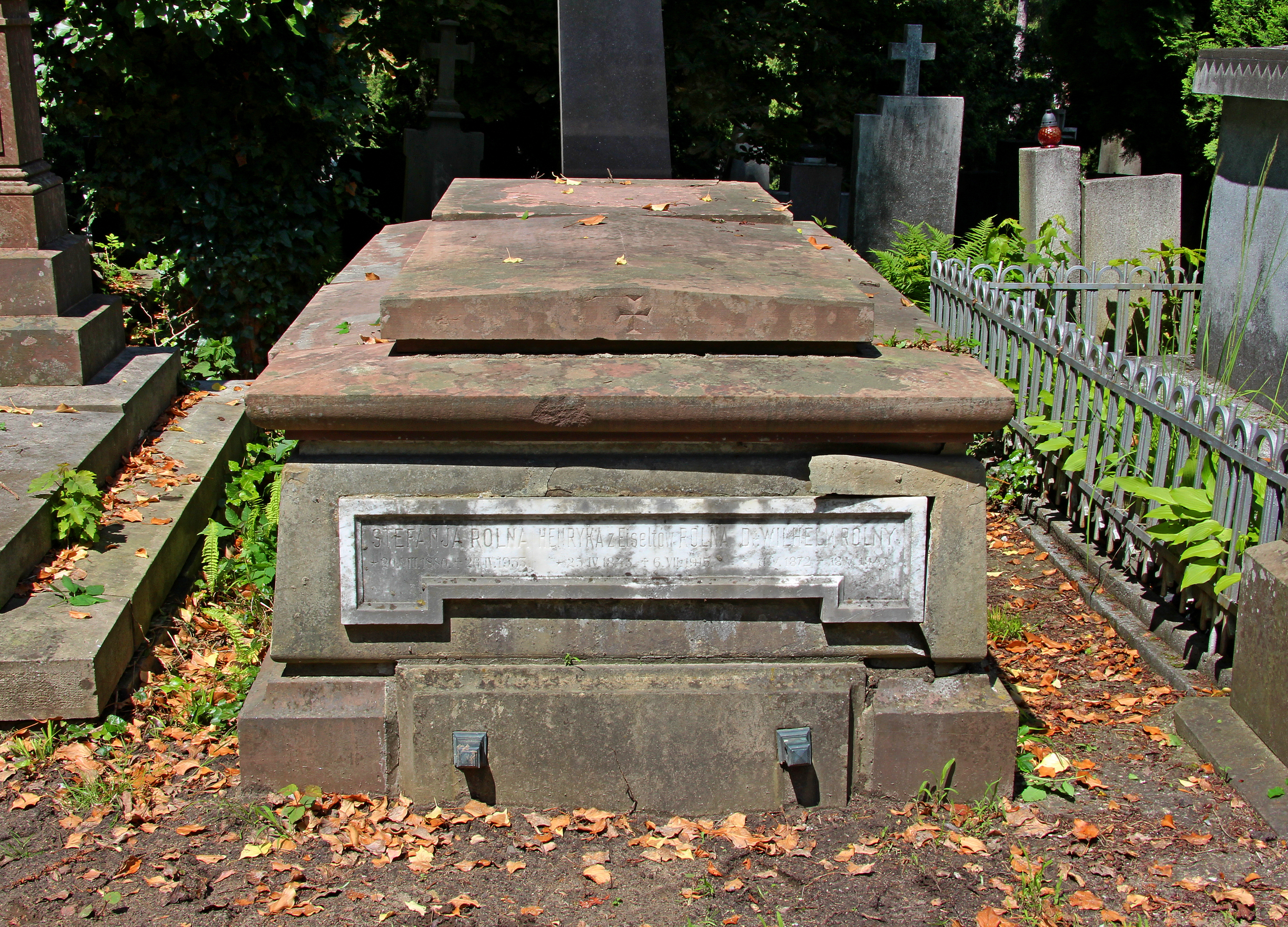 Гробівець родини Рольне. Личаківський цвинтар , поле № 2.